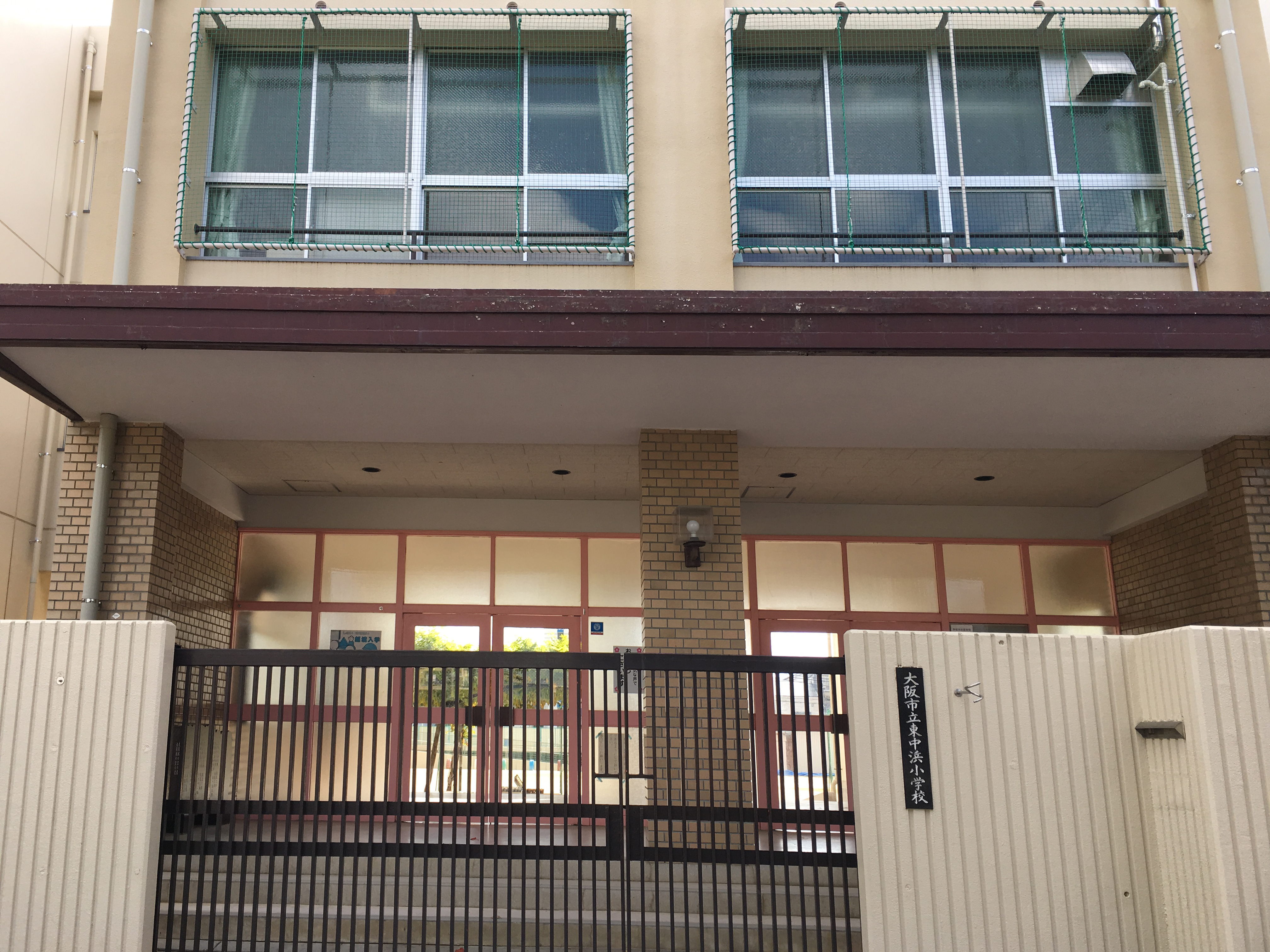 大阪市立東中浜小学校